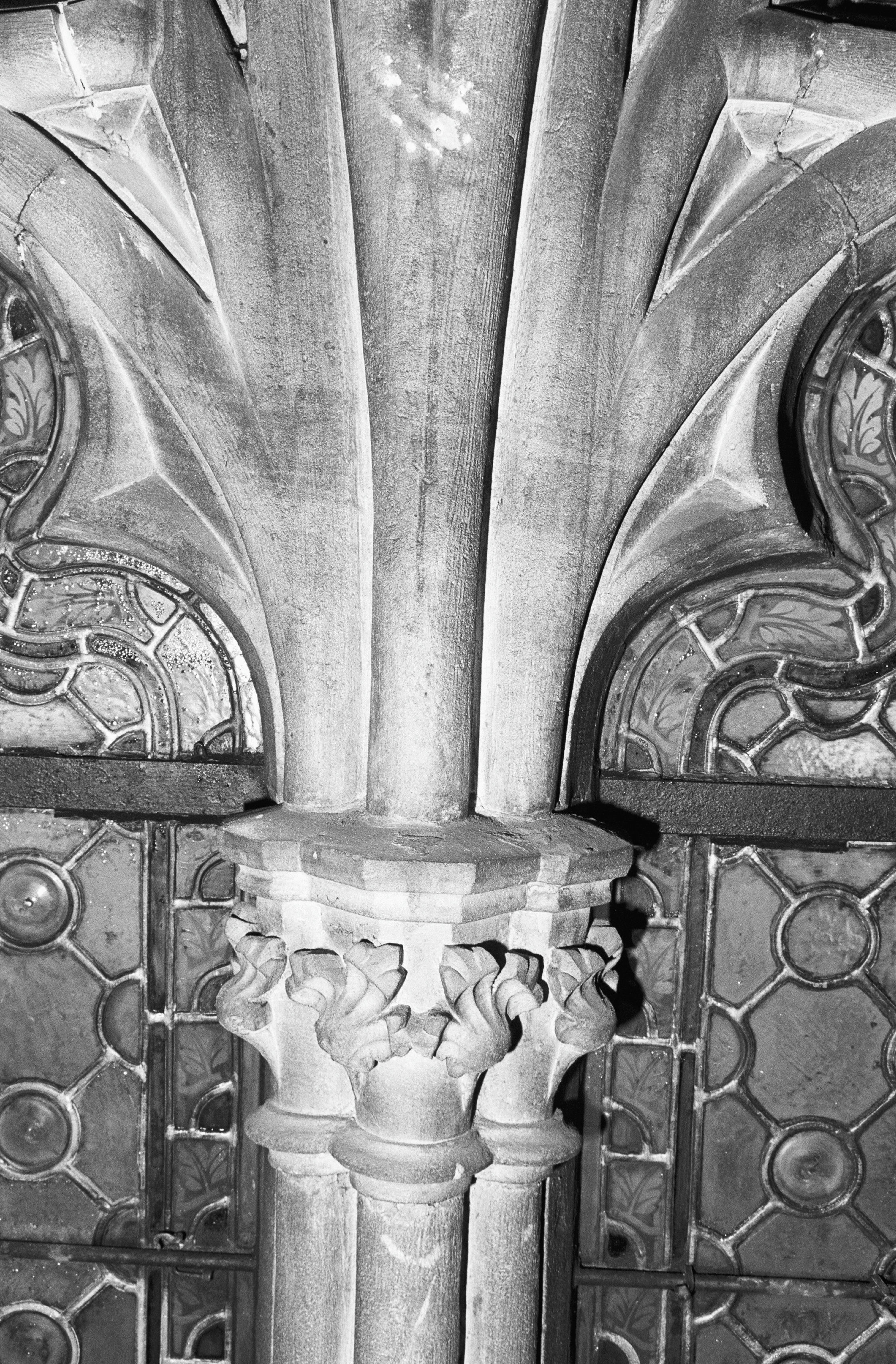 Basiliek: INTERIEUR, KAPITEEL